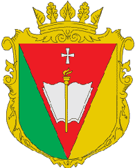 Герб Рівненського району